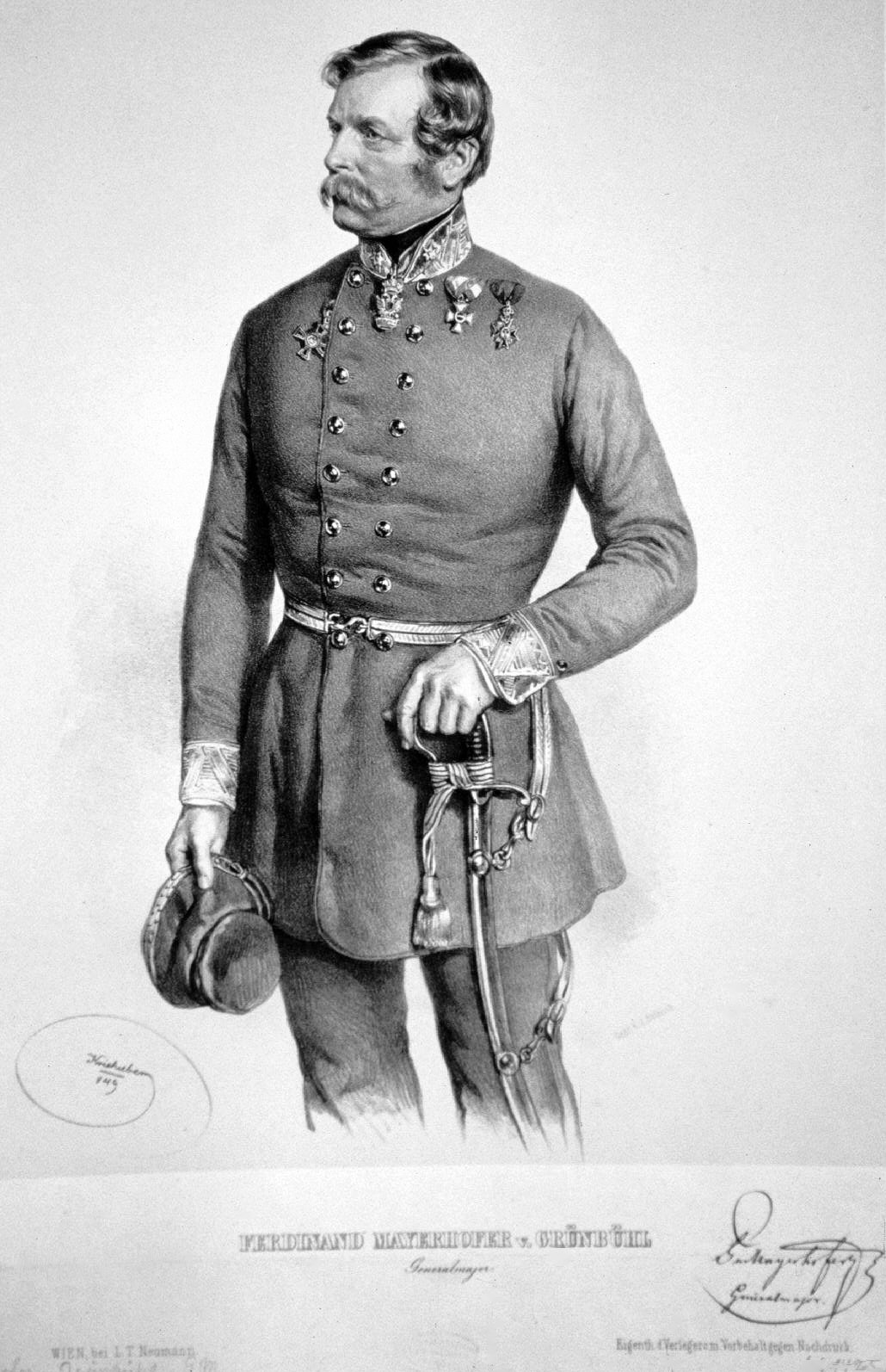 Ferdinand Mayerhofer von Grünbühl (1798-1869), Feldmarschallleutnant, Diplomat, Freund Schuberts.